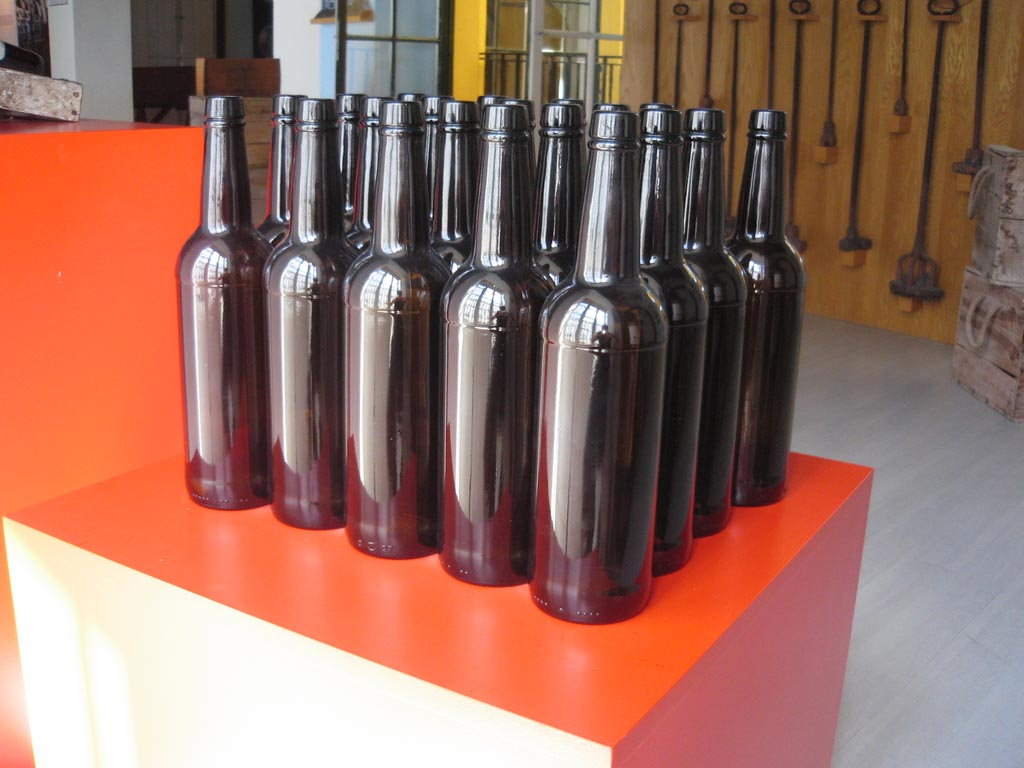 Botellas propias del jerez, en el Museo de la Manzanilla de Bodegas Bardadillo, en Sanlúcar de Barrameda